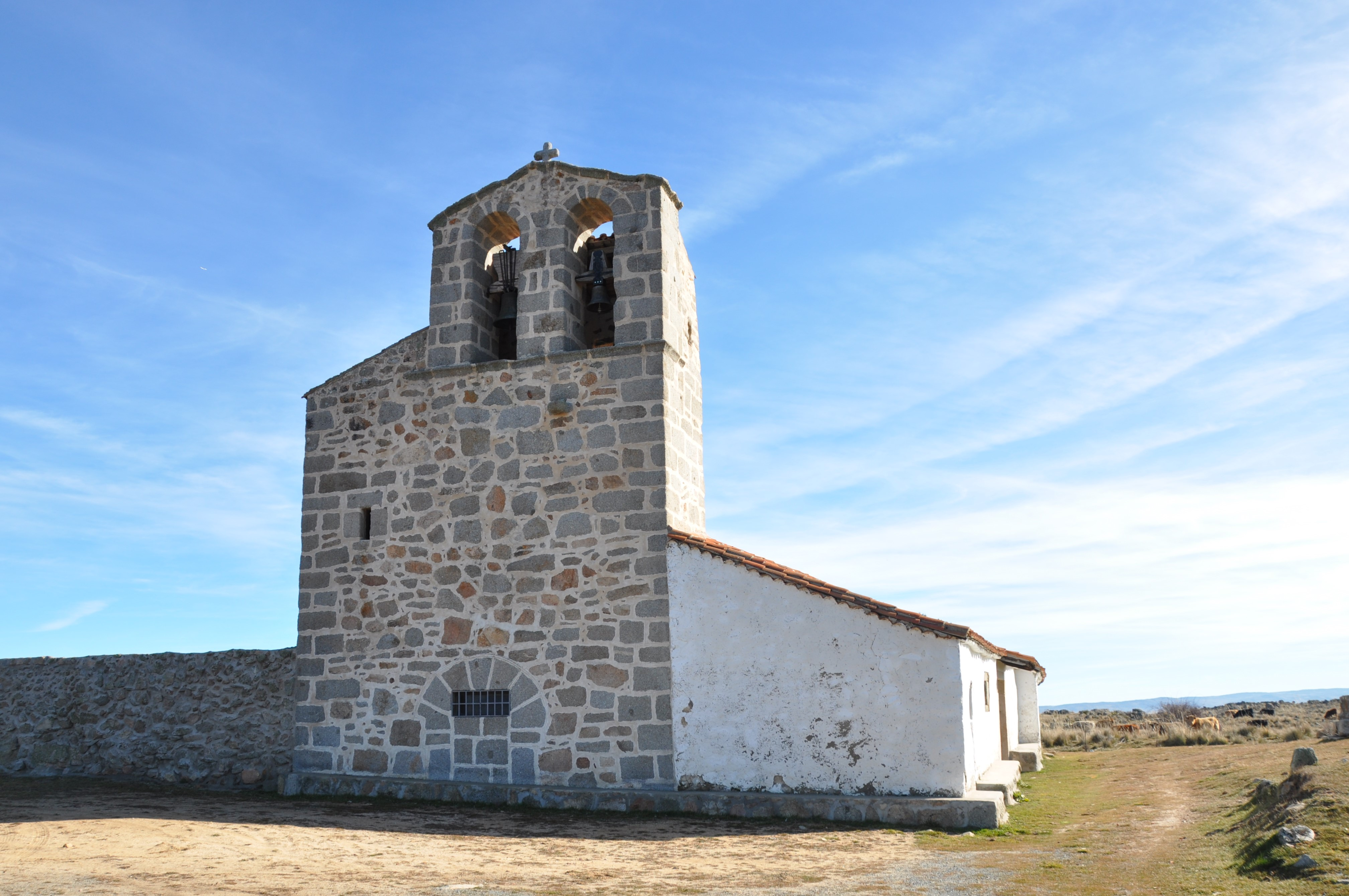 Iglesia de Nuestra Señora de la Asunción a medio camino entre Casasola y Duruelo, Ávila, España